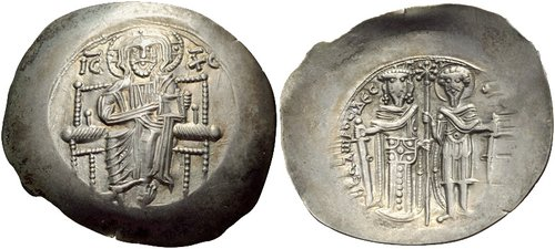 Áspro Traqueia do imperador niceno Teodoro I Láscaris